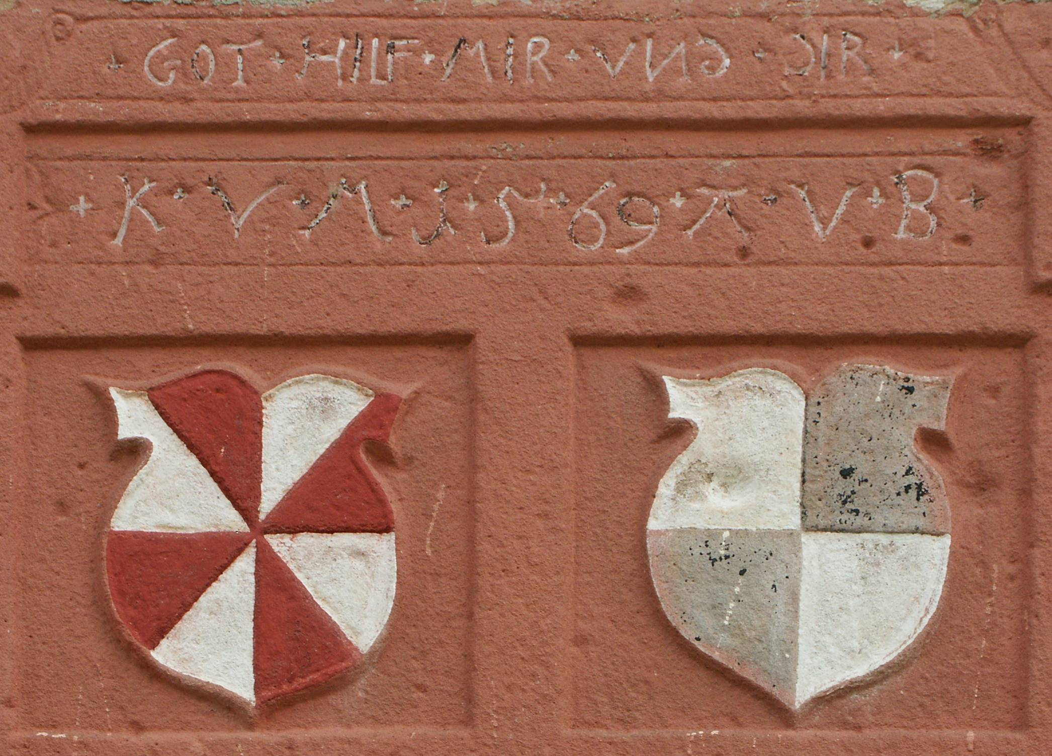 Wappenstein am Unterhof, das sogenannte Blaue Schloss in Mansbach. Es war Wohnsitz der Familie von Mansbach. Links das Wappen derer von Mansbach, rechts das Wappen derer von Boyneburg